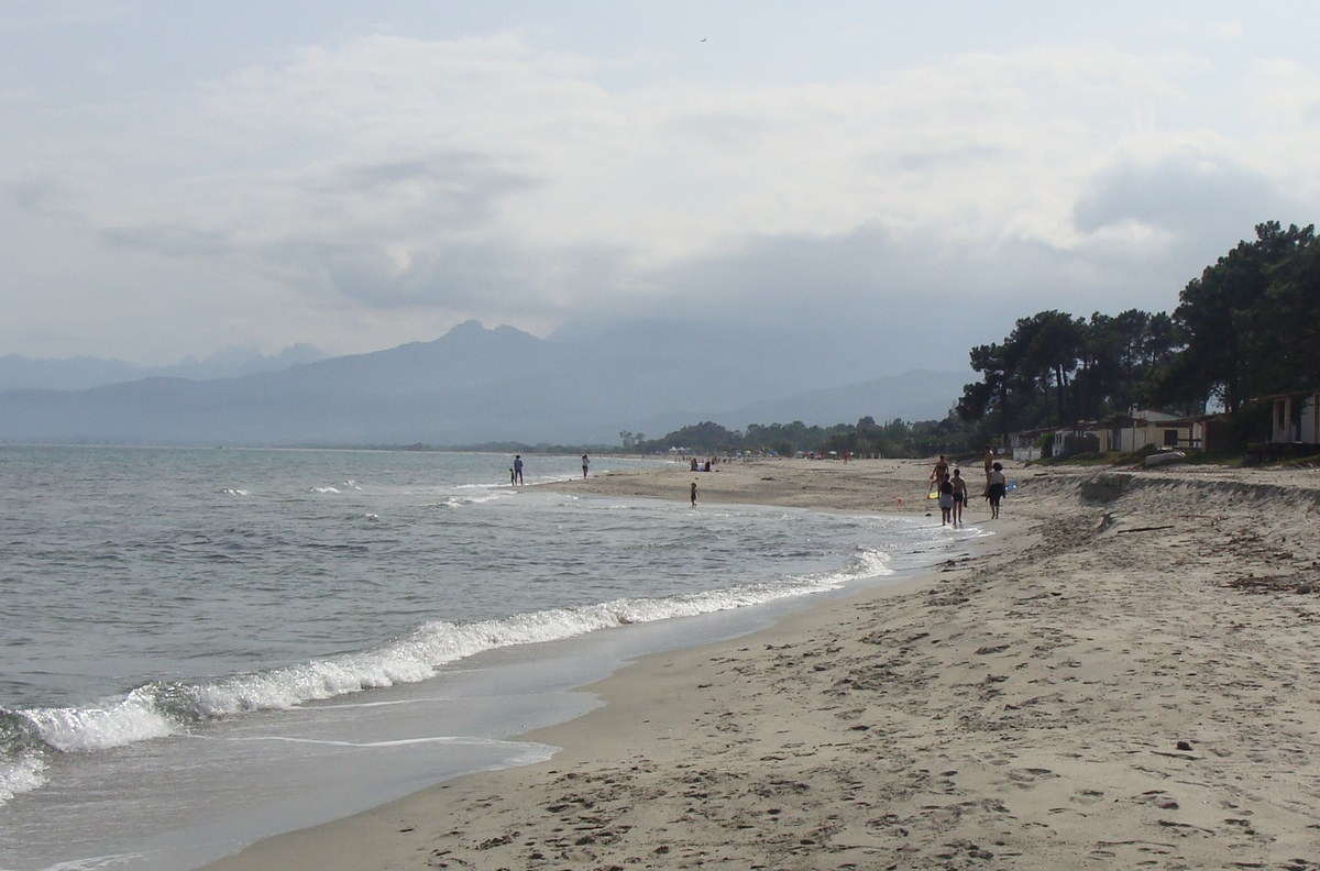 La plage de Vignale, vue en direction du sud